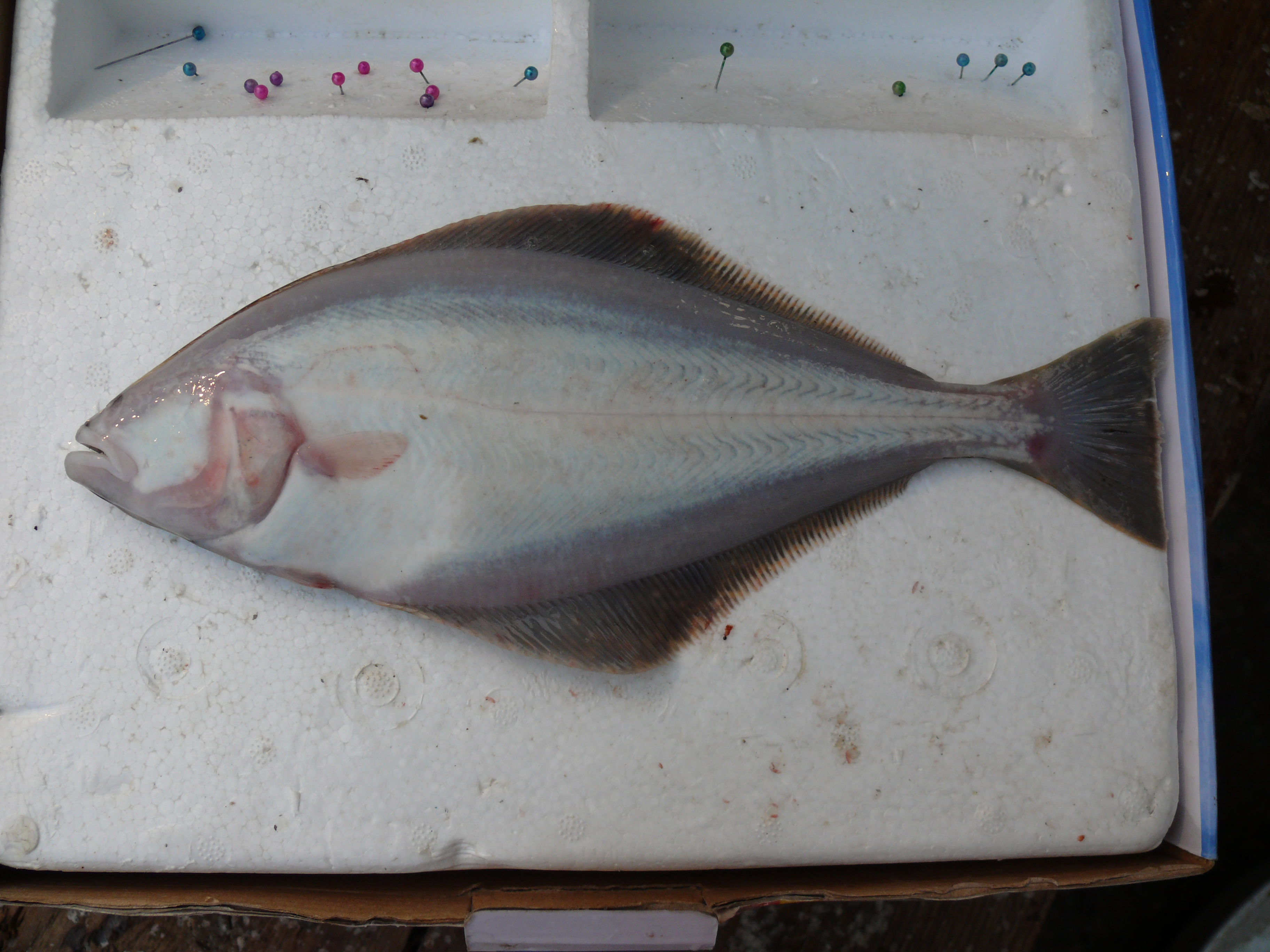 Неполовозрелый белокорый палтус северных Курильских островов. Слепая сторона